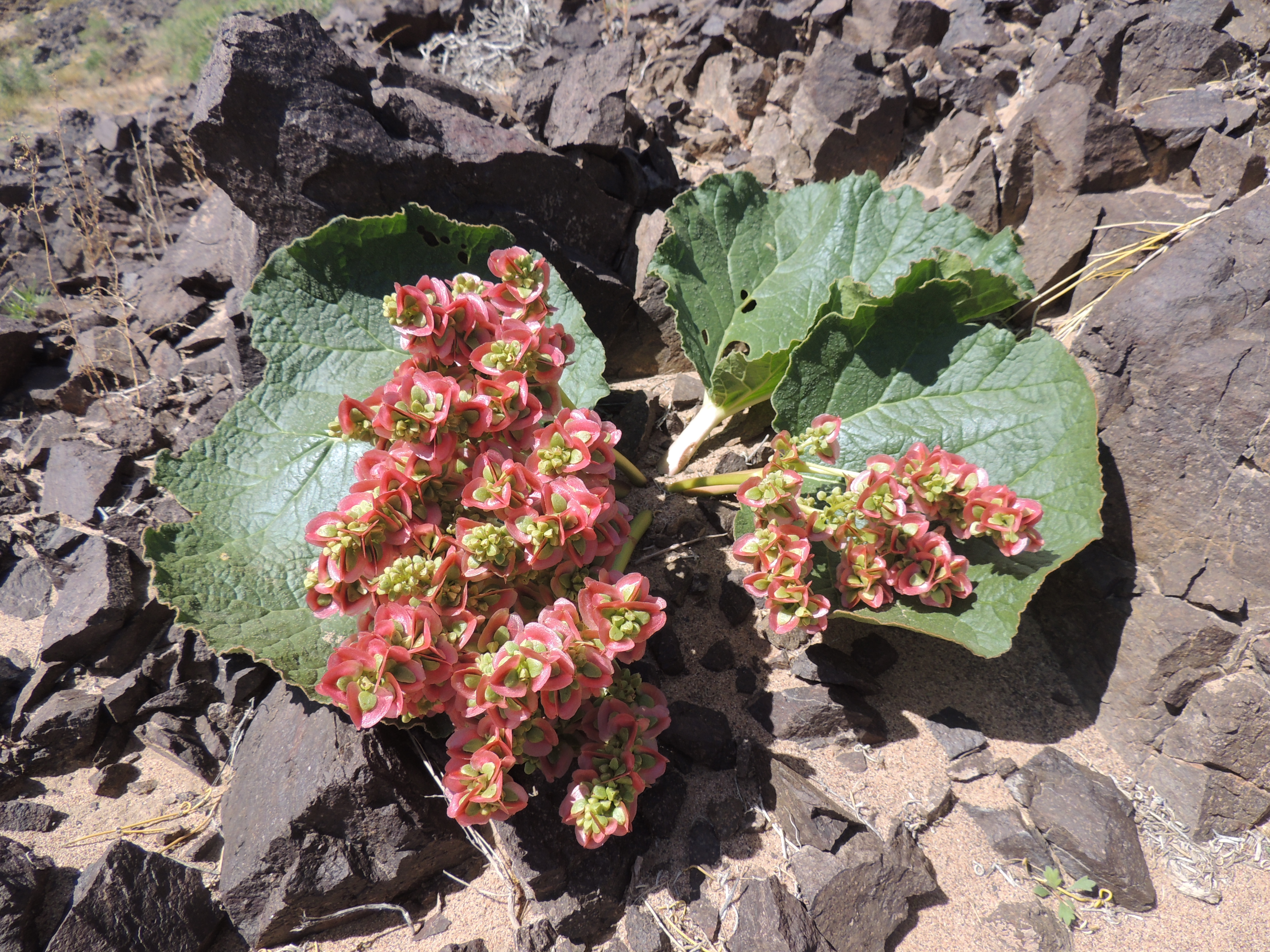 Ревень гобийский